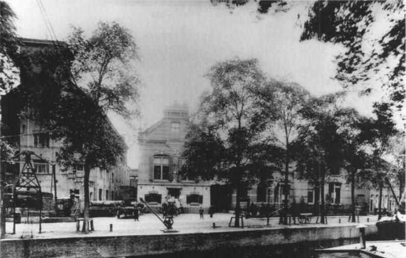 turfsingel